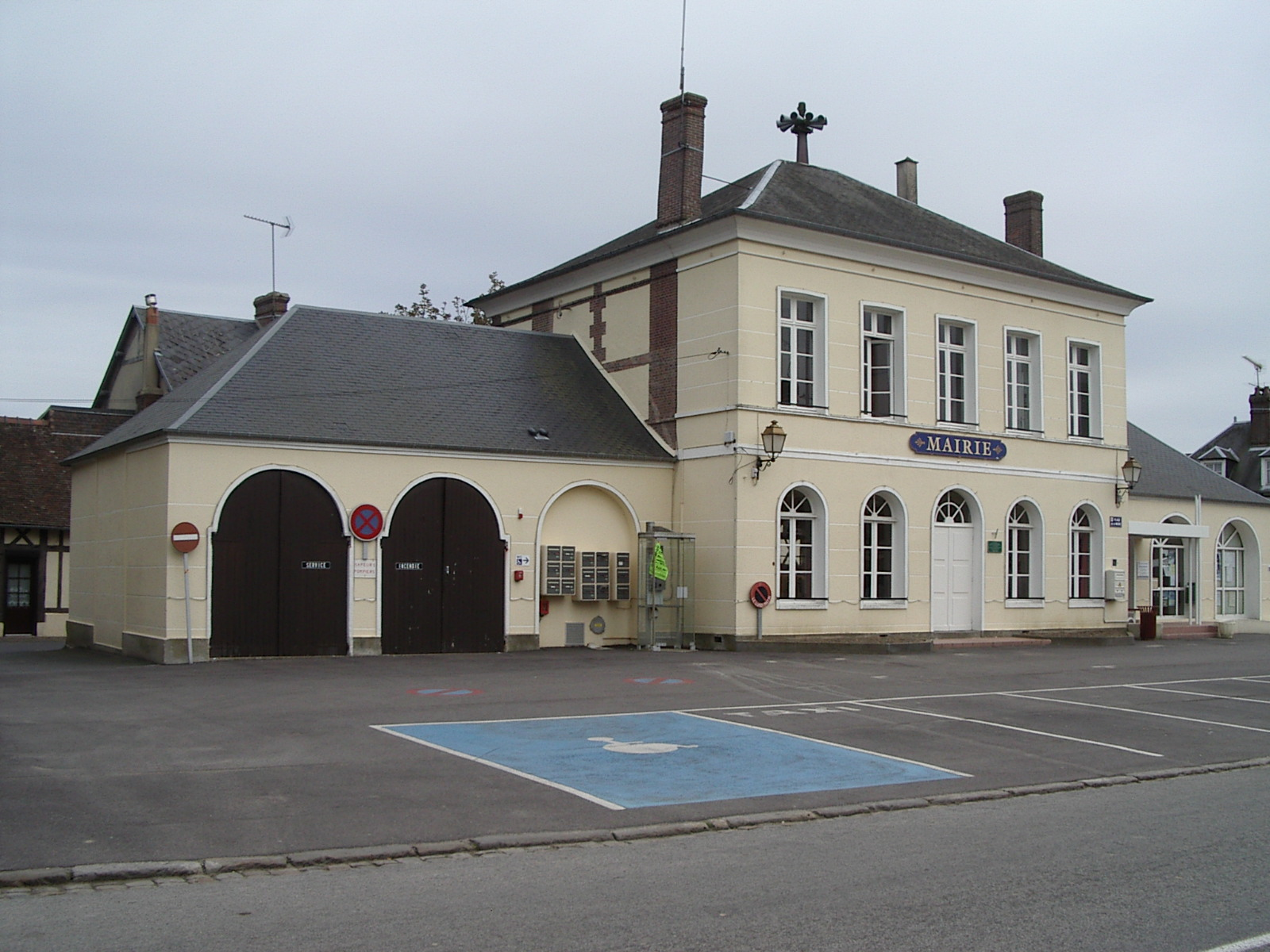 Mairie de Beaumesnil (Eure)